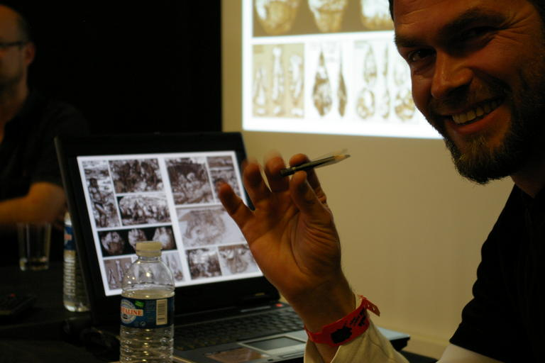 Plagiator